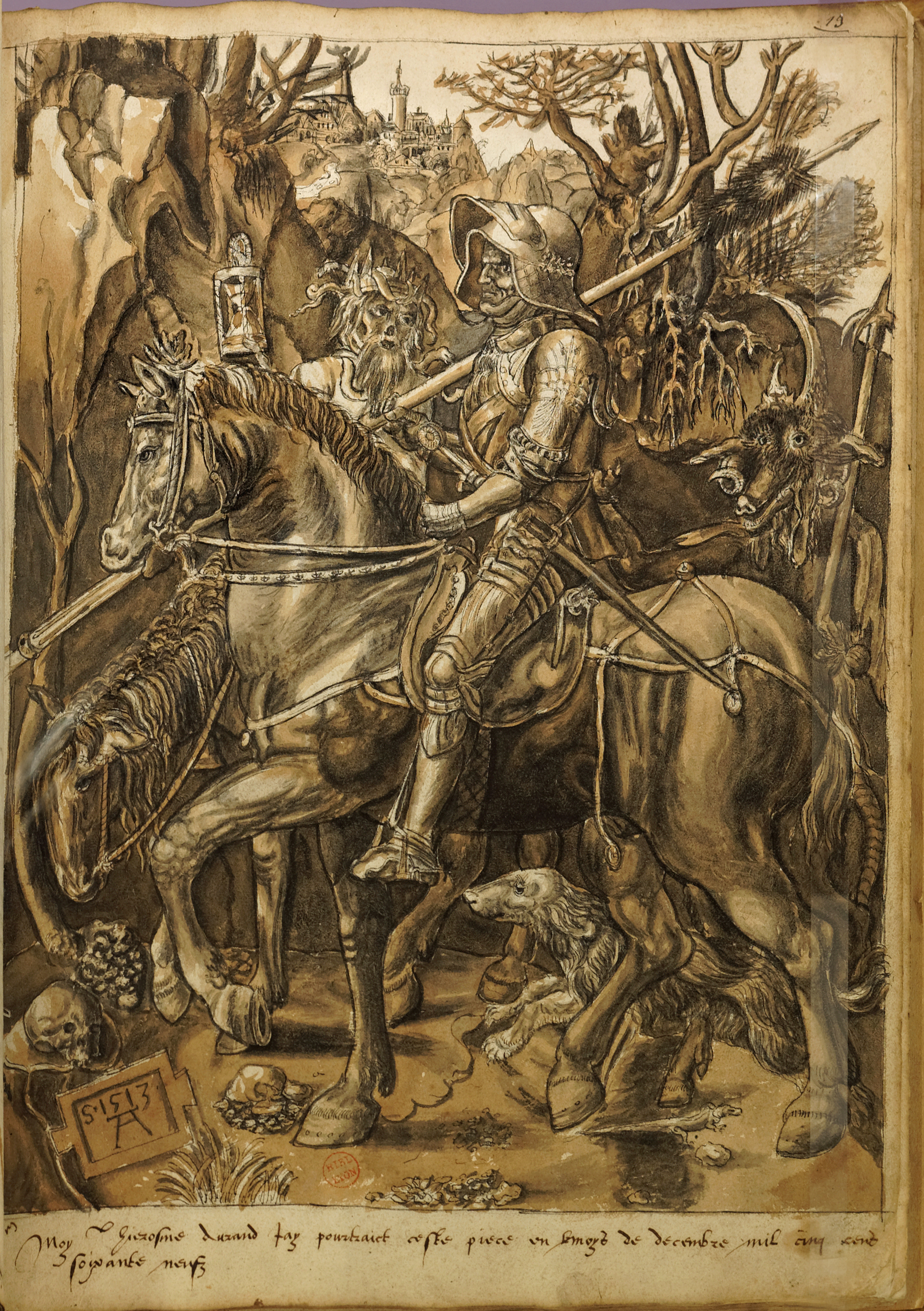 Jérôme Durand (1555-1605), d’après Albrecht Dürer, Le Chevalier, la Mort et le Diable (détail)